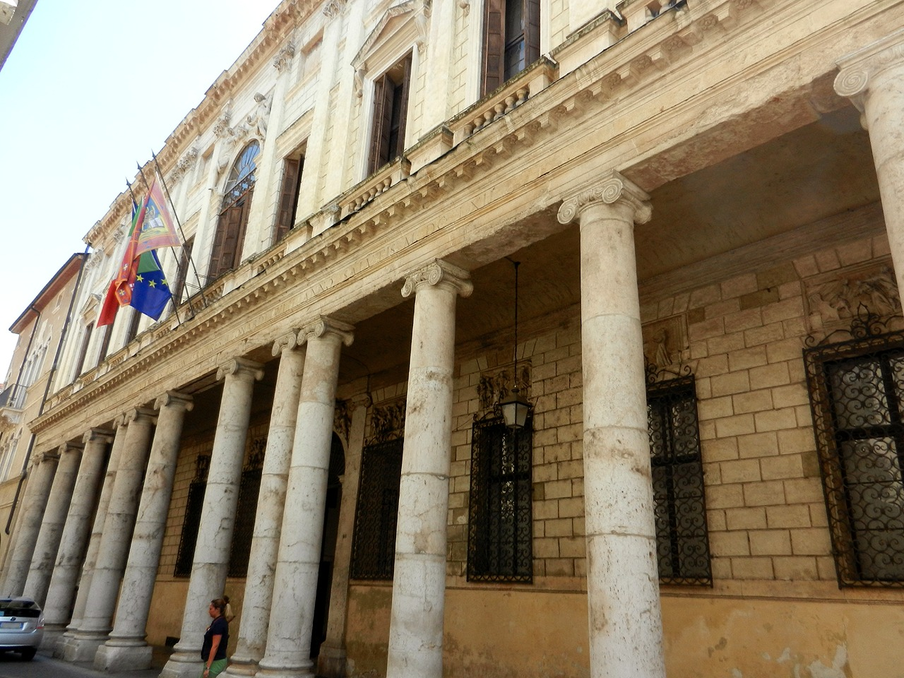 Vicenza - Palazzo Trissino Baston (Municipio)